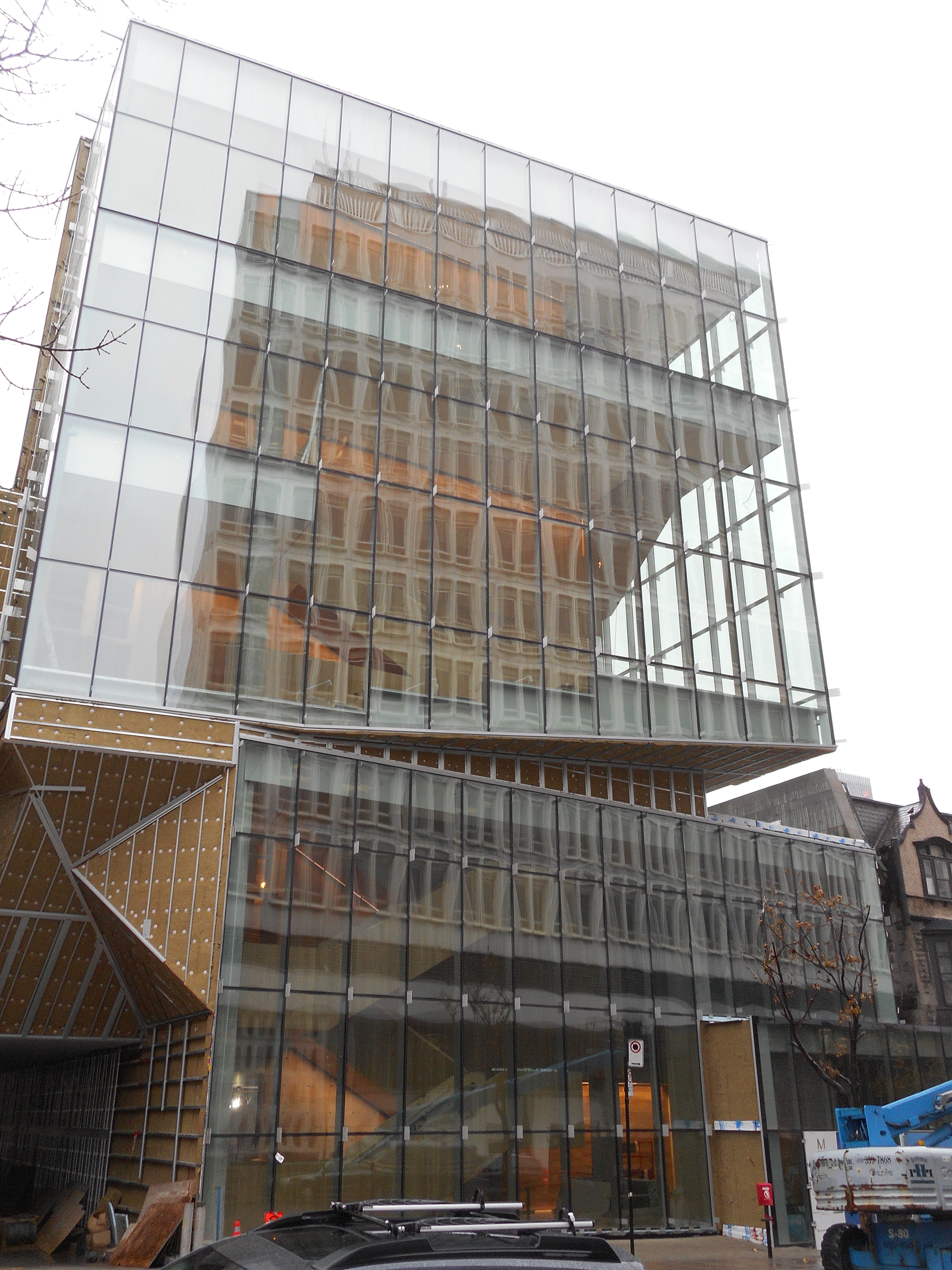 Pavillon pour la Paix Michal and Renata Hornstein, rue Bishop, Montréal